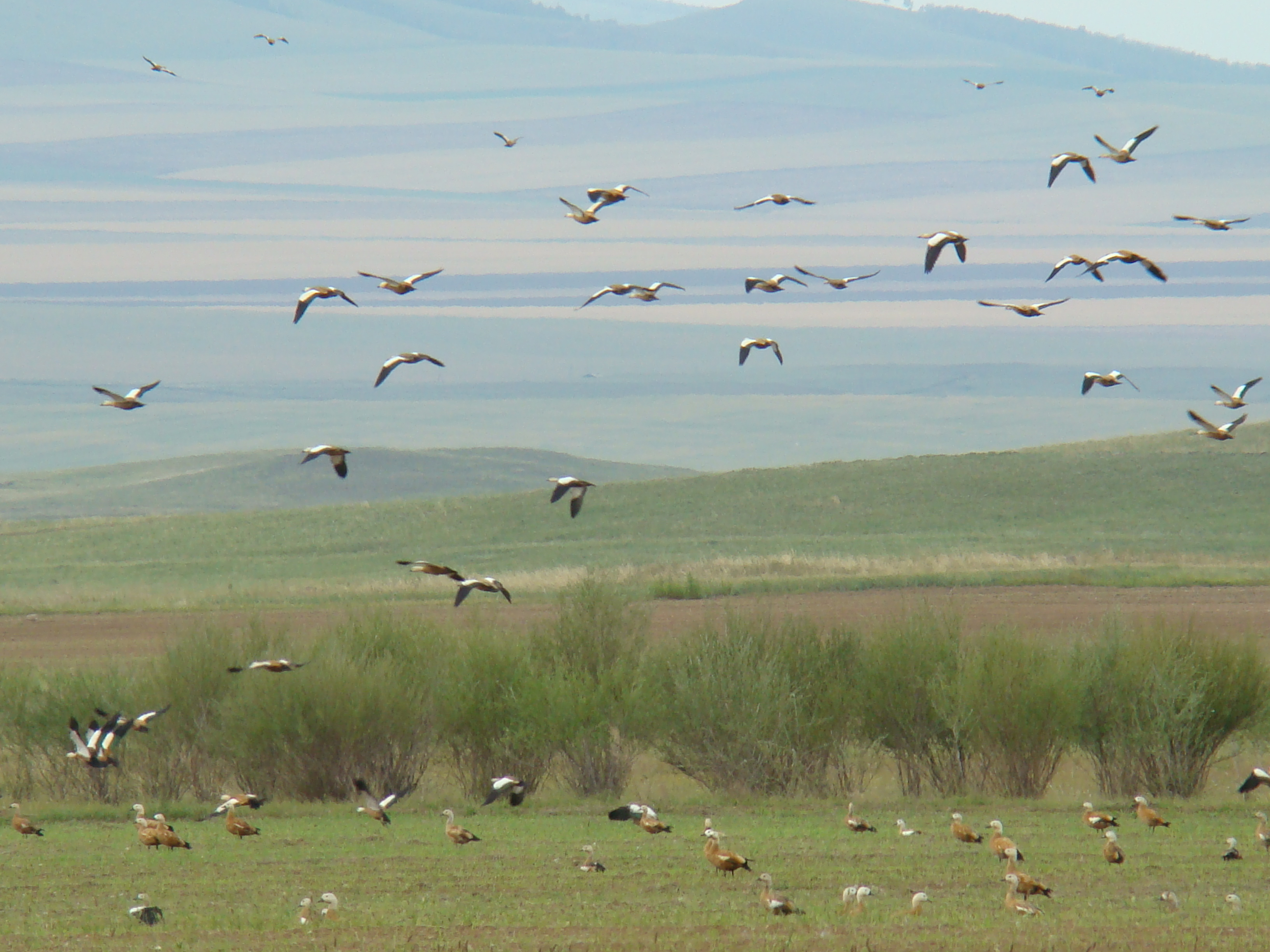 Боргойский заказник. Огари. Белоозерск (Джидинский район)